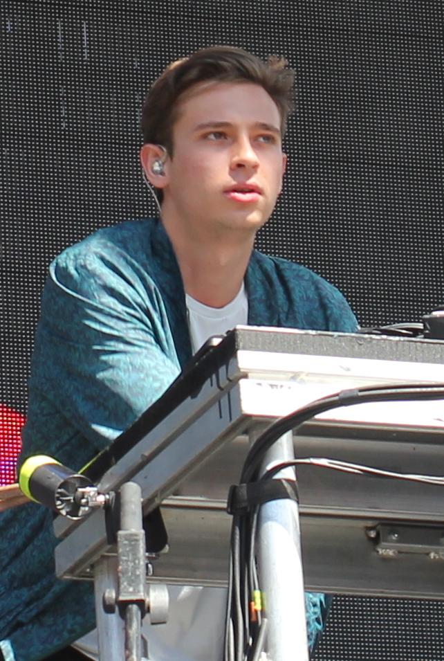 Flume